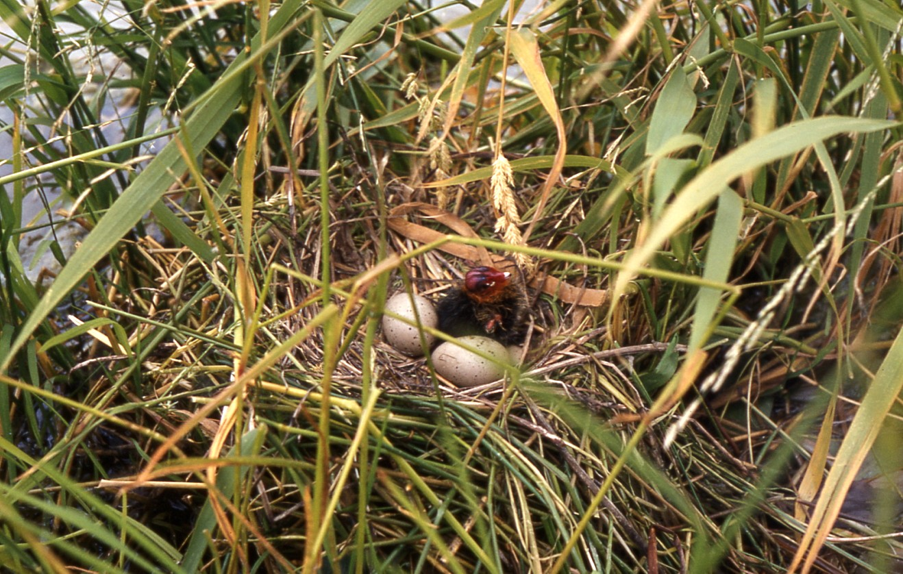 Nest der Teichralle mit Eiern und geschlüpftem Jungen am Ufer eines Baggersees zwischen Röhricht aus Rohrglanzgras (Phalaris arundinacea).